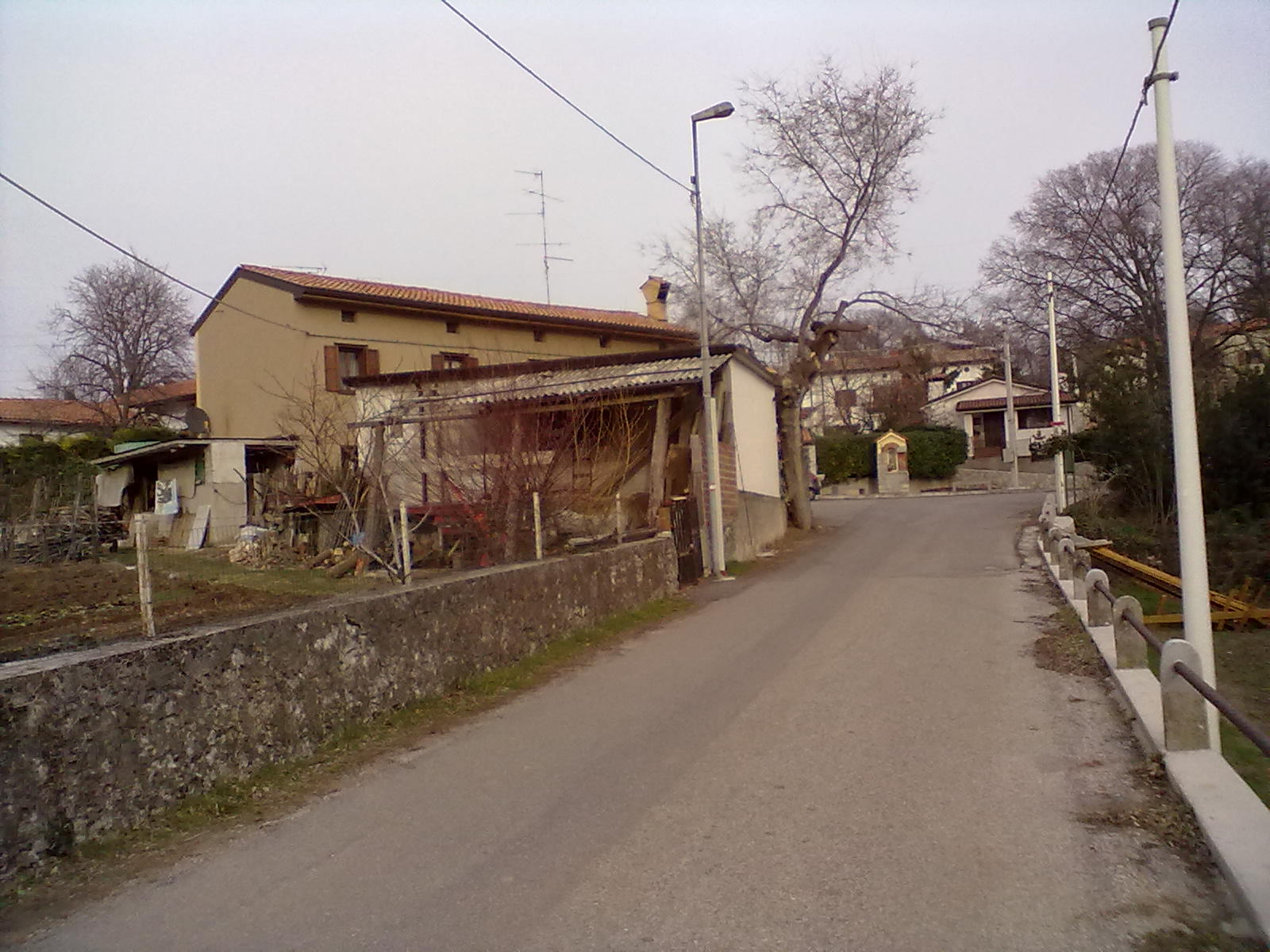 La località di Medeazza